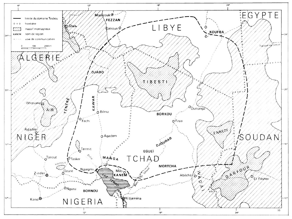 Baroin Catherine. Organisation territoriale, organisation sociale : la logique du système toubou. In: Journal des africanistes. 1986, tome 56 fascicule 2. pp. 7-27.